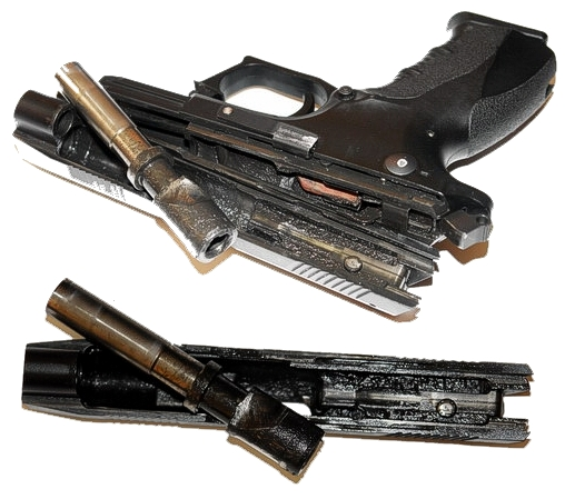 Grand Power pistol